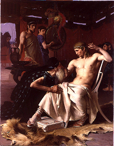 Joseph Wencker, Priam aux pieds d'Achille, 1876, Paris, Ecole Nationale Supérieure des Beaux-Arts